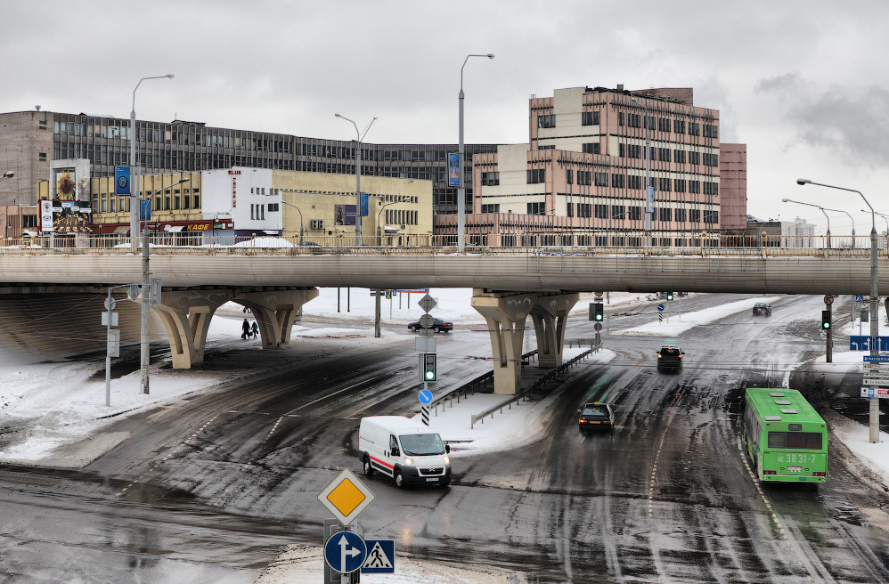 Замалёўкі Мінска